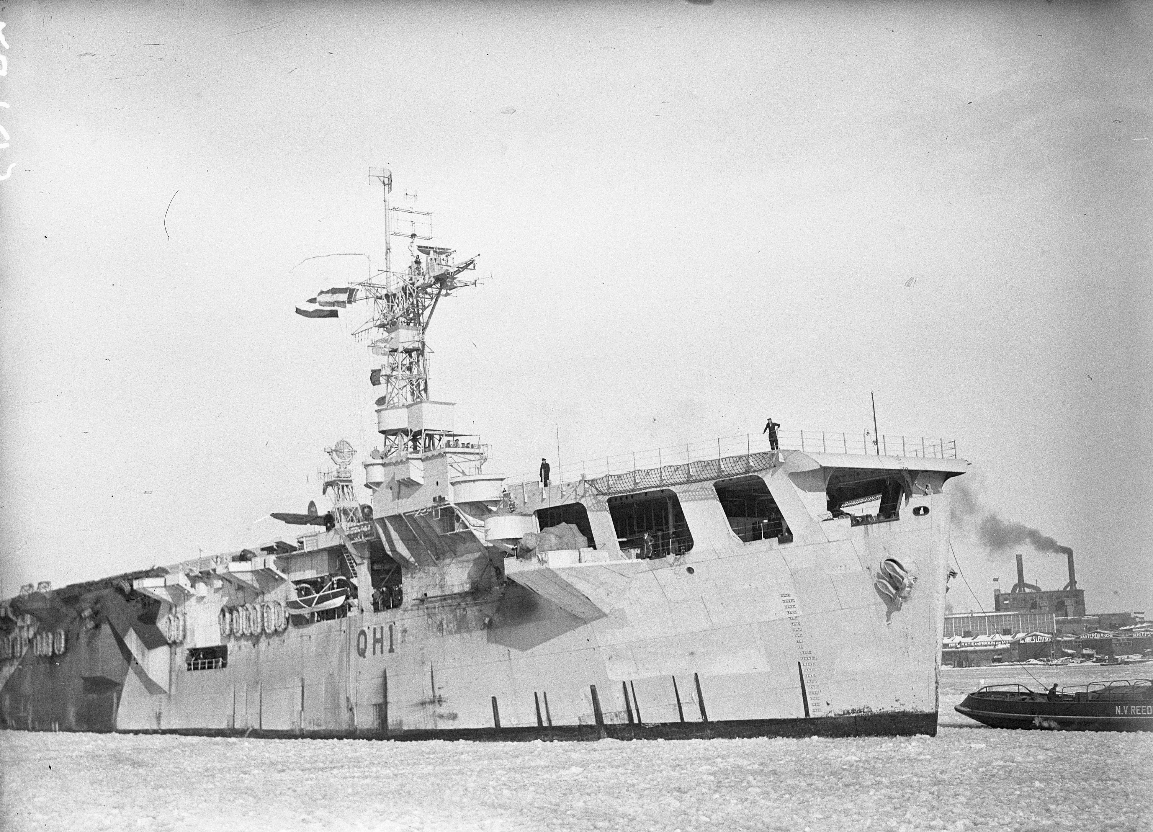 Collectie / Archief : Fotocollectie Anefo Reportage / Serie : [ onbekend ] Beschrijving : Hr. Ms. "Karel Doorman" terug in Holland Datum : 18 februari 1947 Locatie : Den Helder, Noord-Holland Trefwoorden : marine, schepen Fotograaf : Sagers, Harry / Anefo Auteursrechthebbende : Nationaal Archief Materiaalsoort : Glasnegatief Nummer archiefinventaris : bekijk toegang 2.24.01.09 Bestanddeelnummer : 902-0463